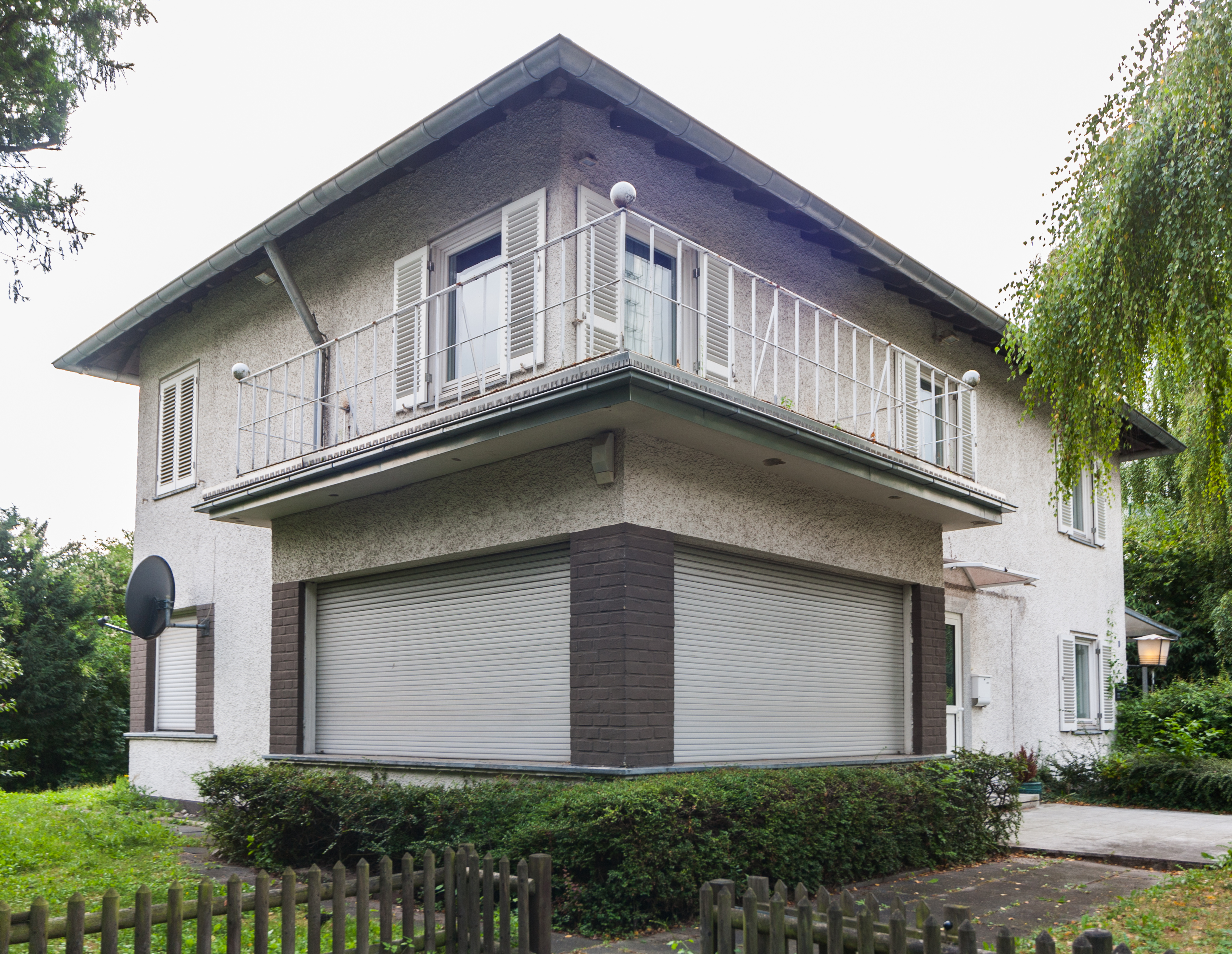 Botschaft der ehemaligen Jugoslawischen Republik Mazedonien (jetzt Außenstelle), Sträßchensweg 6, Bonn